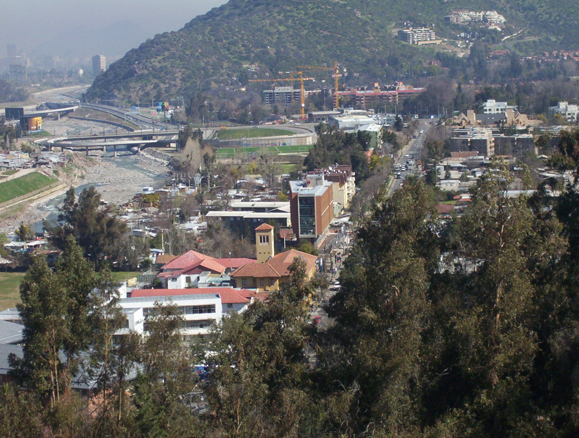 Vista del pueblo de Lo Barnechea, desde el Cerro 18, en la comuna de Lo Barnechea, Chile. Se ve en primer plano la Parroquia